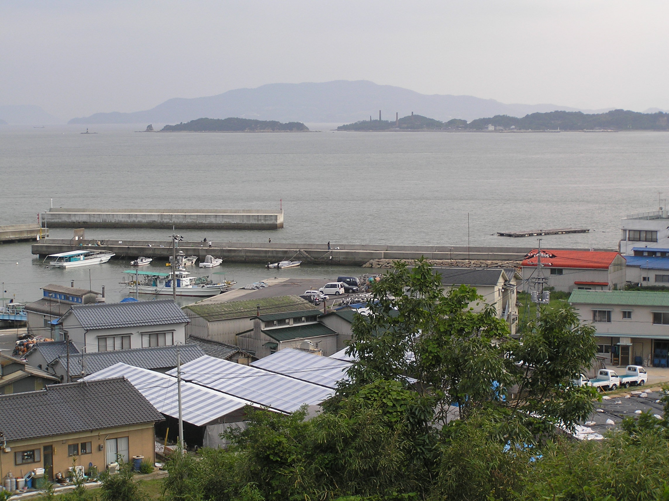 2004-05-22 Inujima,犬島